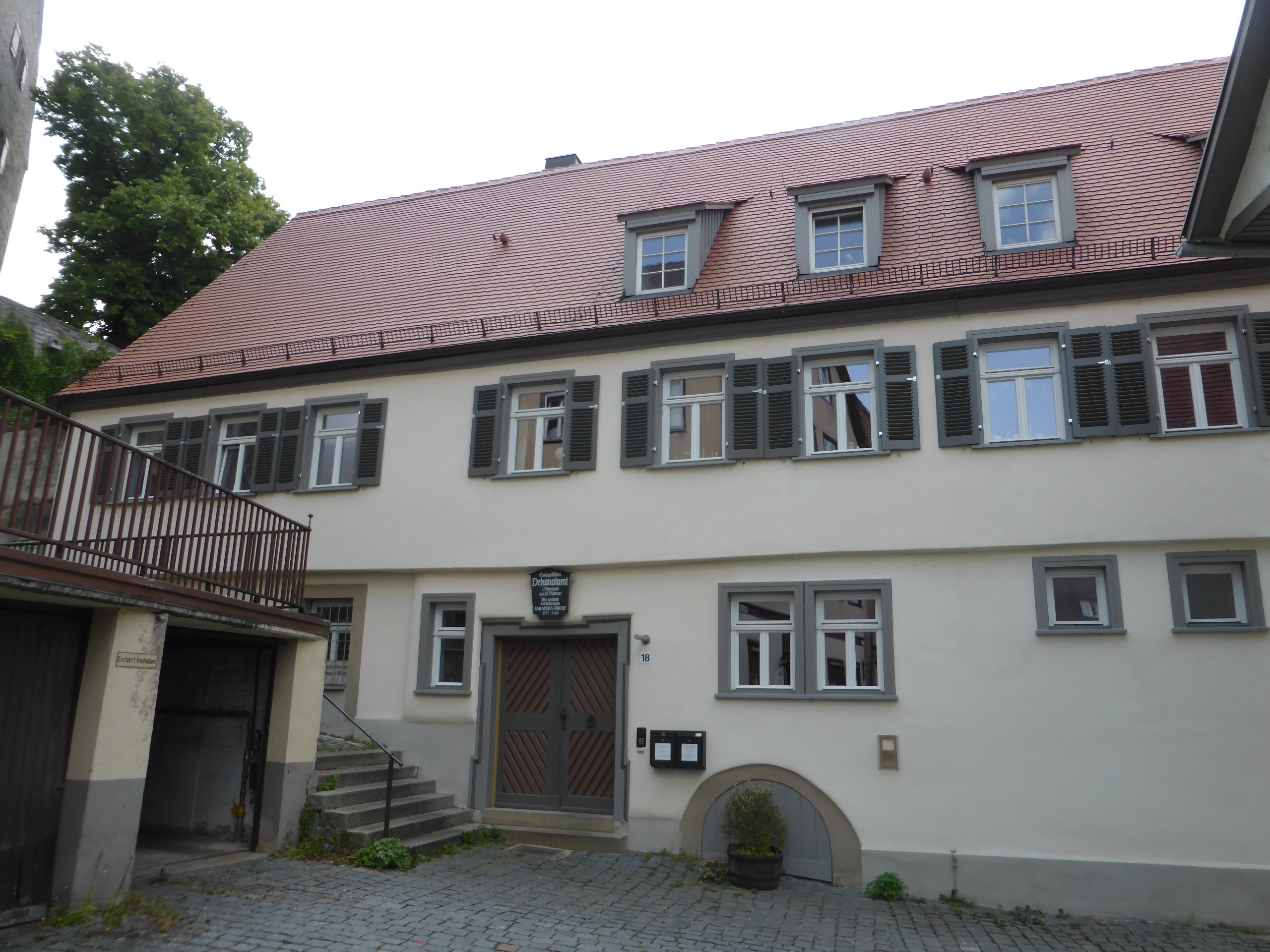 Wohnhaus von Johannes Brenz in Schwäbisch Hall